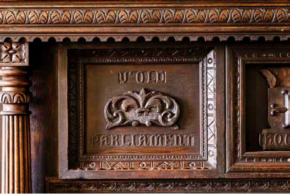 Rhan Chwith Aelwyd Southover Grange - Llun gyda chaniatâd Carlotta Luke (2016)